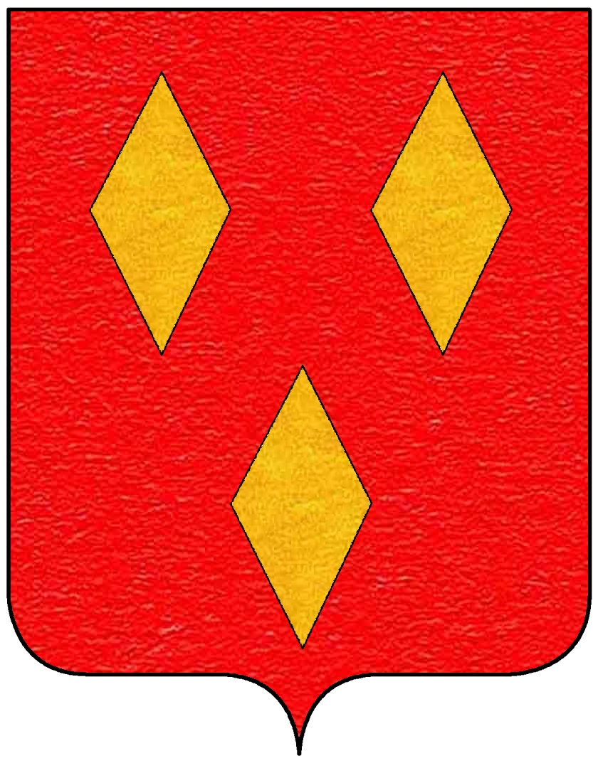 Stemma della famiglia Salimbeni